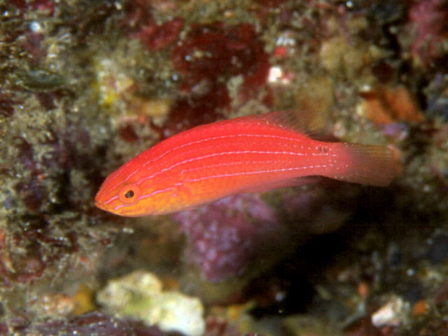 ツキノワイトヒキベラ Cirrhilabrus lunatus